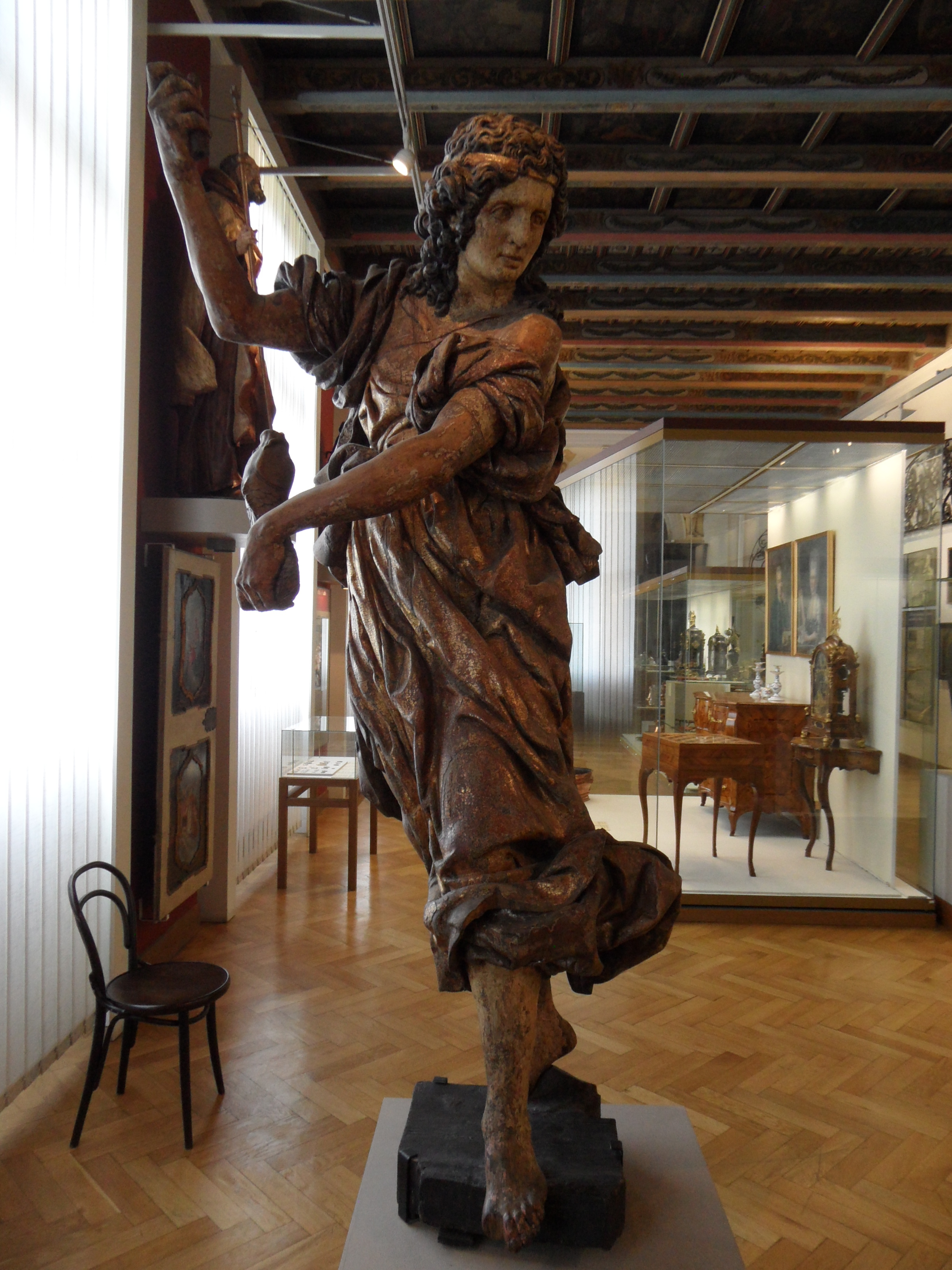 Socha Archanděla Rafaela, Muzeum hlavního města Prahy (po 1650) - Jan Jiří Bendl